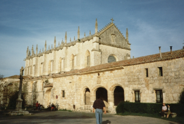 Cartuja de Miraflores (Burgos, Spain)